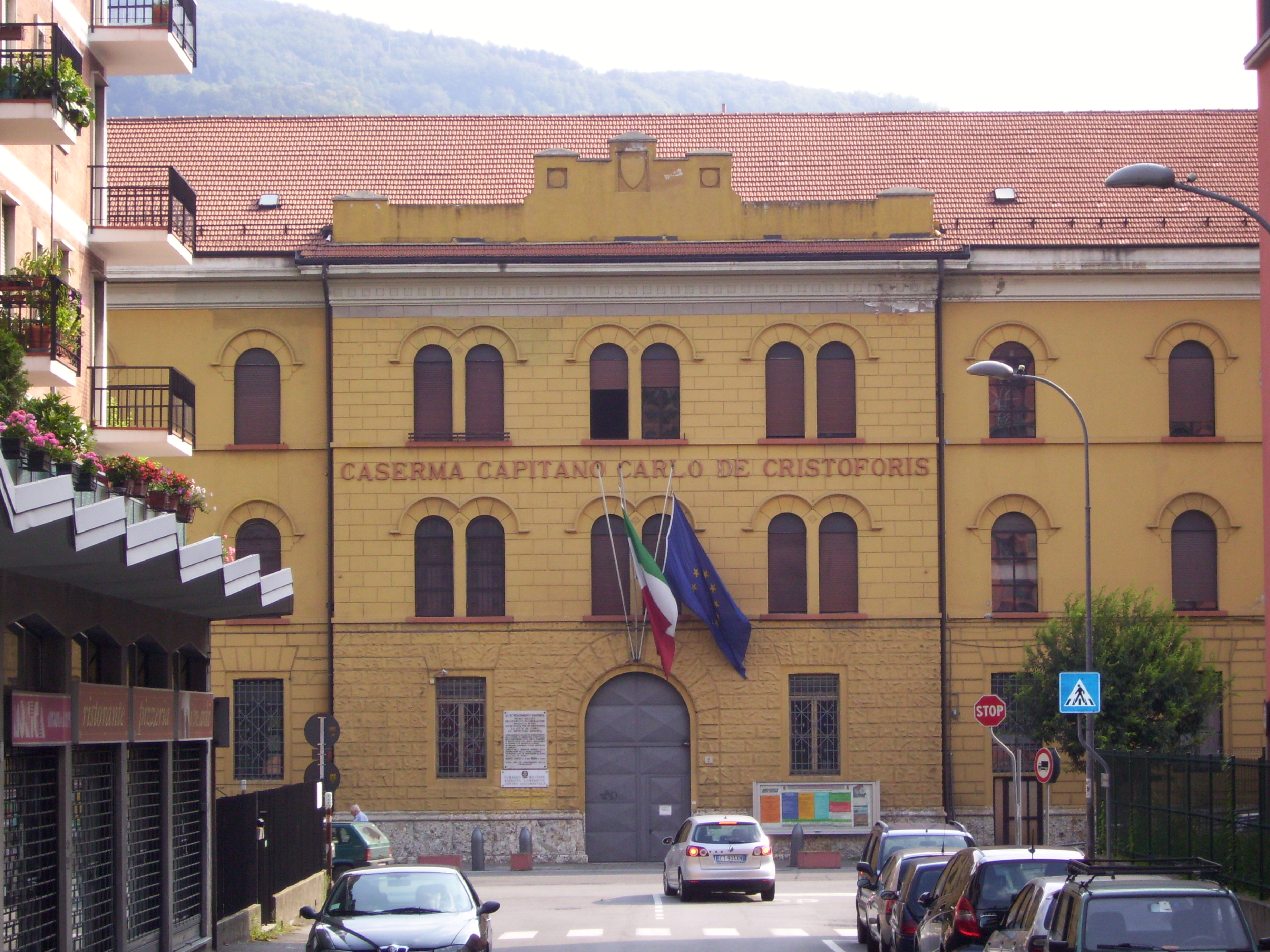 La Caserma De Cristoforis, dedicata ad un combattente garibaldino